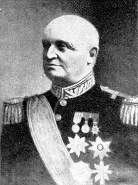 Christian Wilhelm Engel Bredal Olssøn (1844-1915)